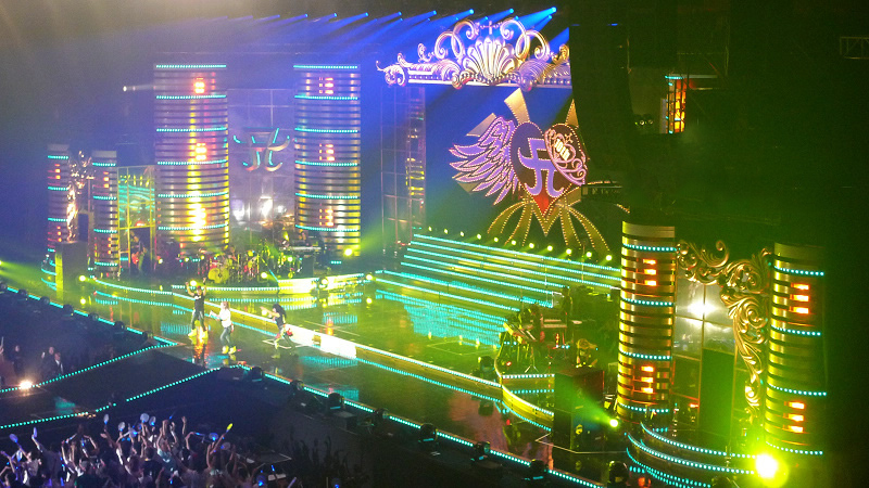 Ayumi Hamasaki Asia Tour 2008 Shanghai